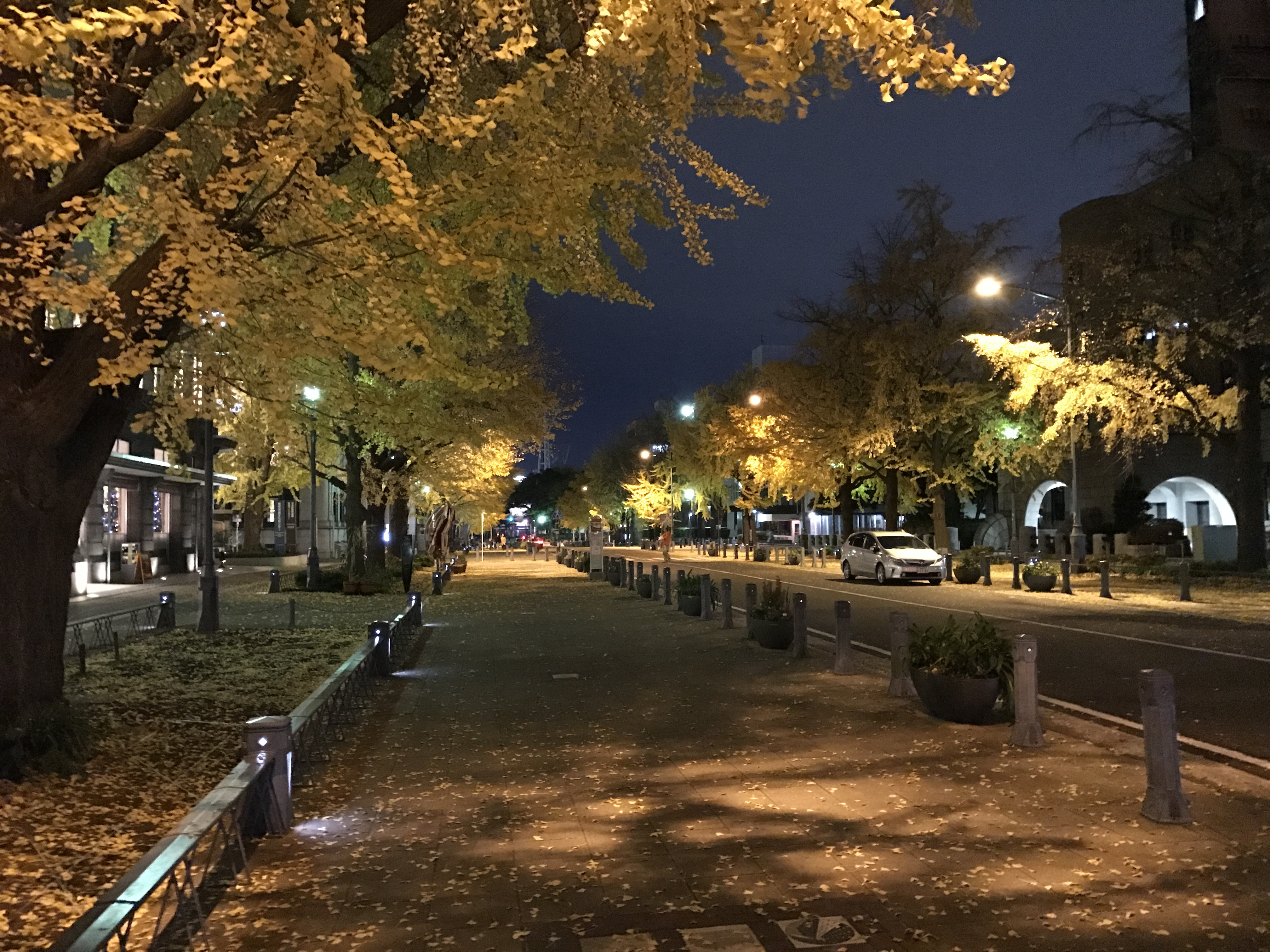 イチョウが色づいている秋の日本大通りの夜景。横浜市中区日本大通り。